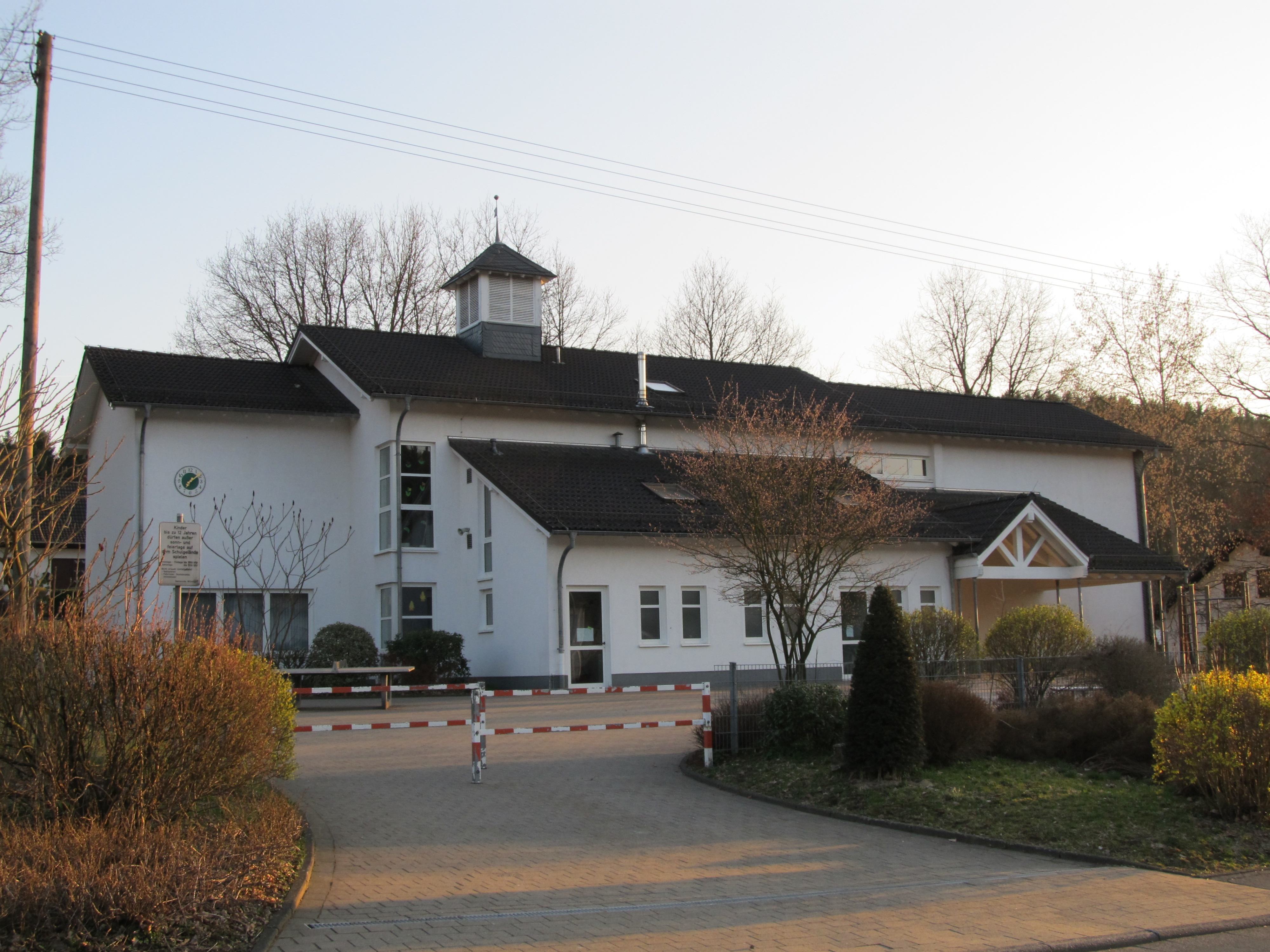 1994 erbaute Grundschule in Wilden, Wilnsdorf, NRW.